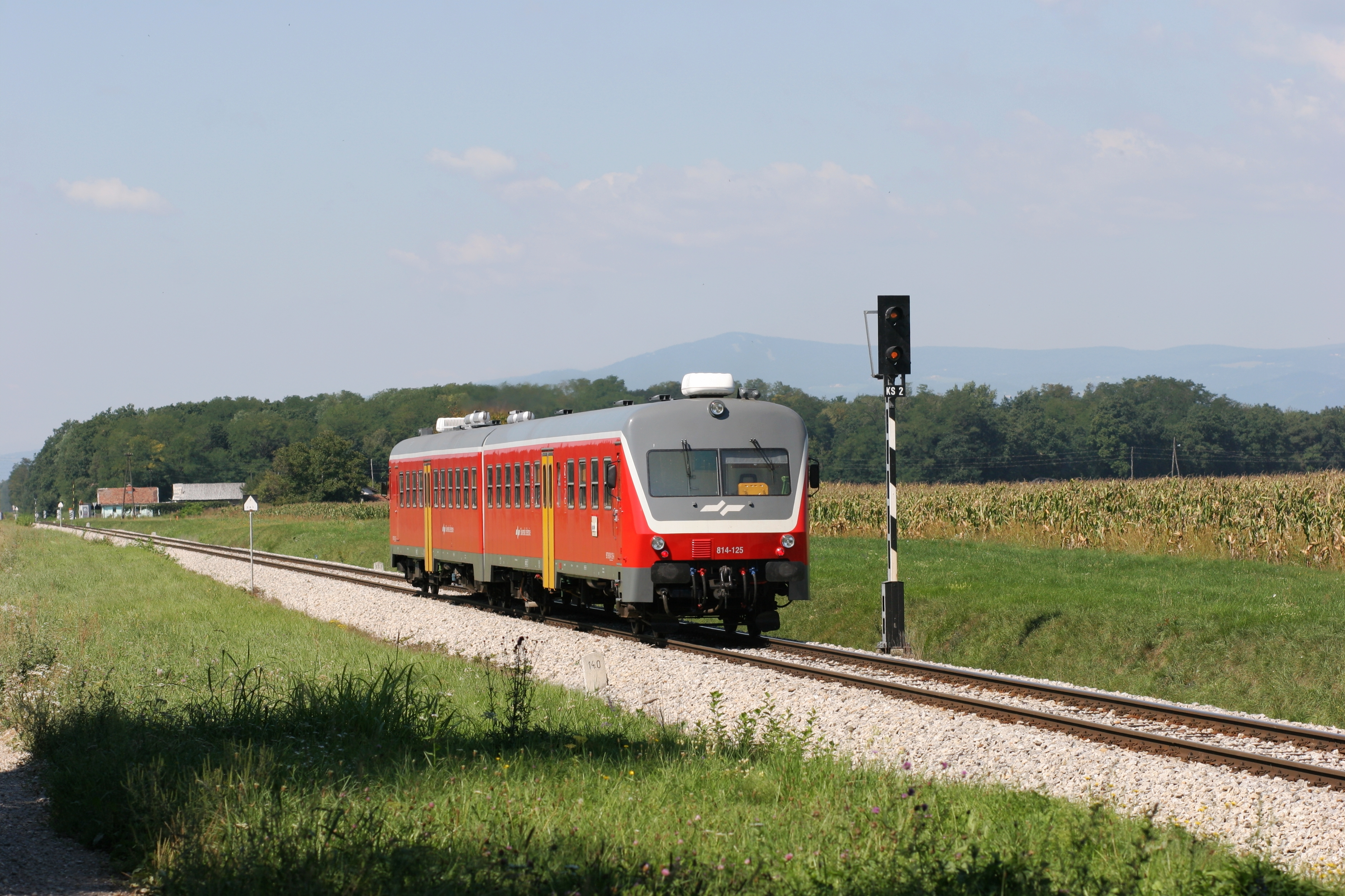 SLO - SZ - 2.3. 814-125 - 2007-08-27 - Hajdina